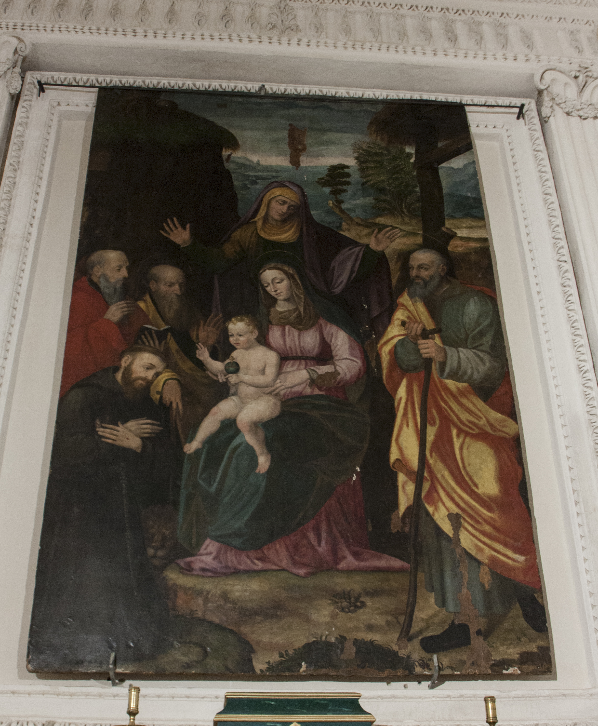 Sacra famiglia e santi - Giovan Paolo Fondulli 1573 cm 266x173 olio su tavola presso cappella di San Domenico